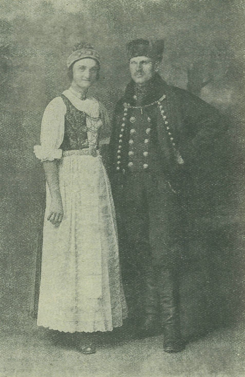 Joža Vochala s chotí Maryčkou v měšťanském jablunkovském kroji